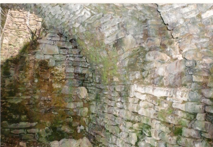 les vestiges du Château, comme ses caves, aujourd'hui, entièrement intactes